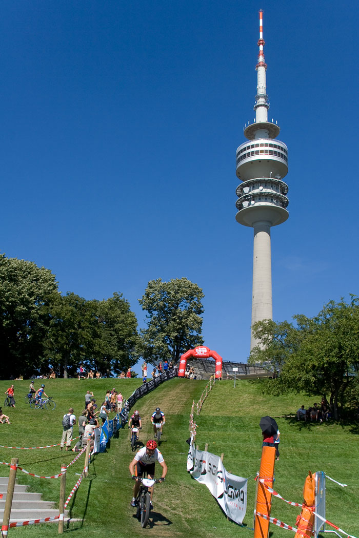 24 Stunden Mountainbike Rennen im Olympiapark München